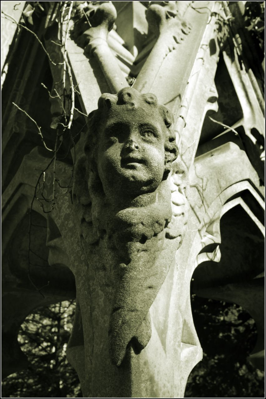 Cherub